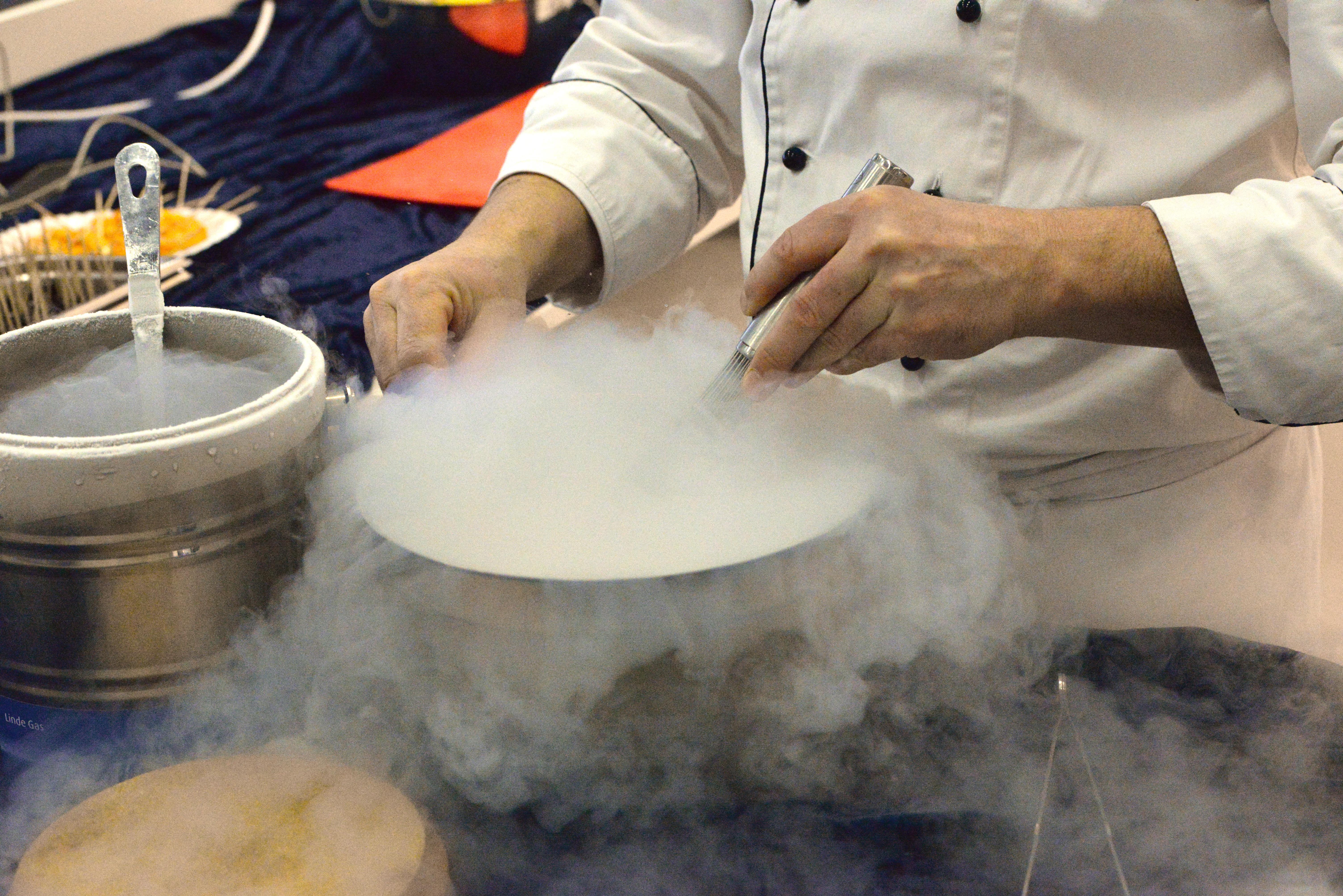 SPD Bundesparteitag Berlin, 10.-12. Dezember 2015, CityCube, Messe Berlin